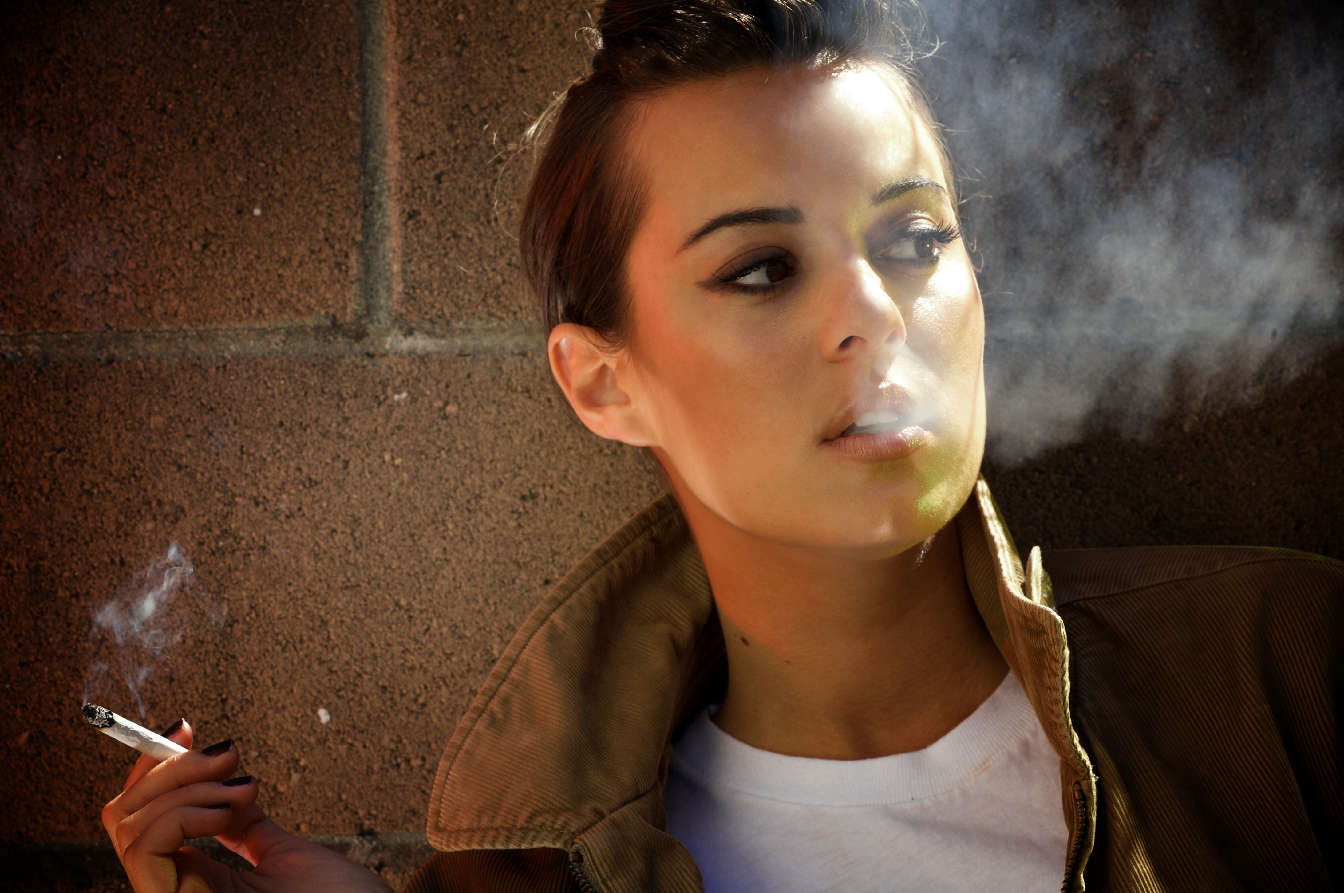 Olivia Evita